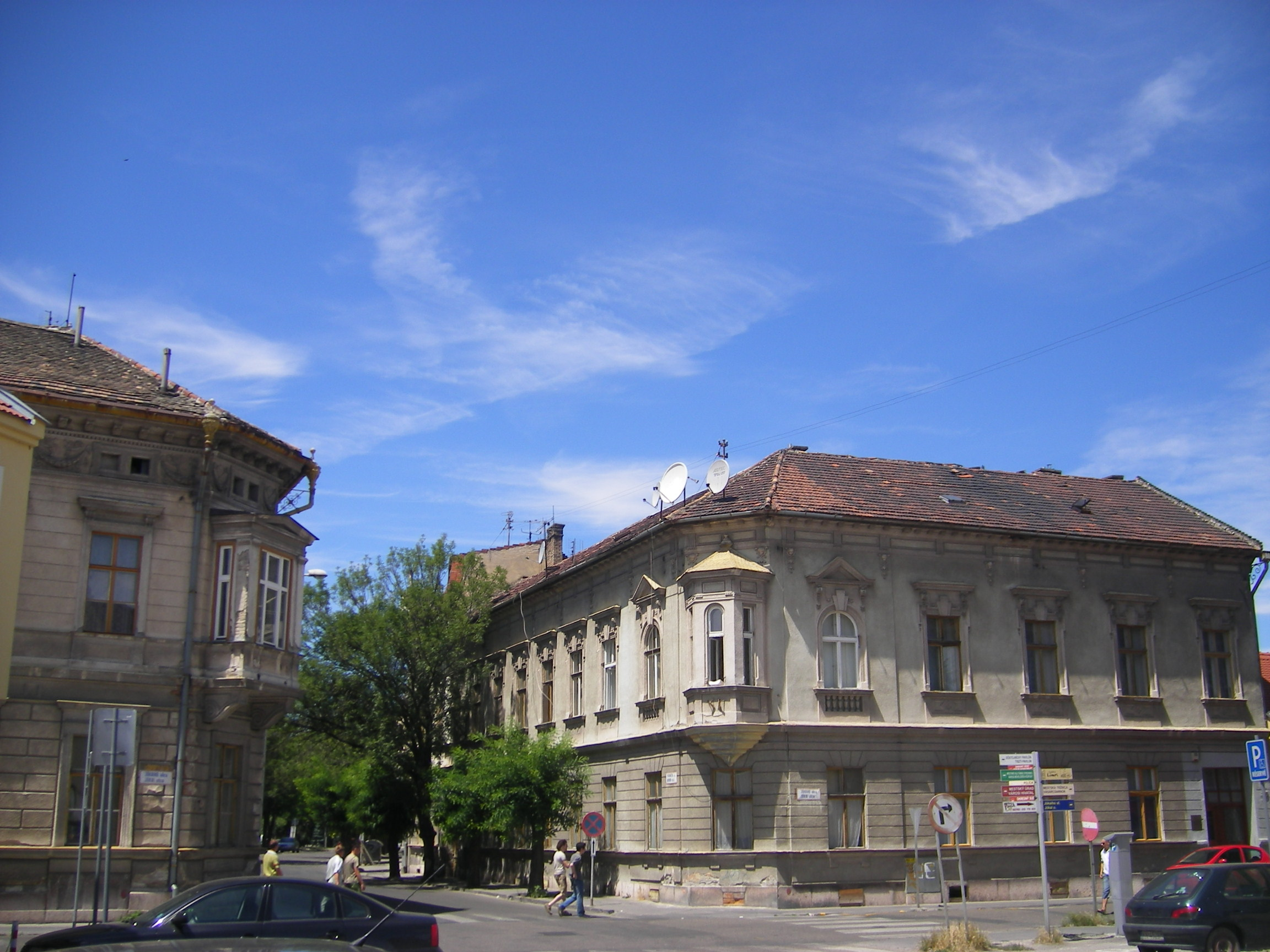 Komárom - a Jókai utca és a Határőr utca kereszteződése